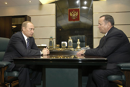 САРАТОВ. Губернатор Саратовской области Дмитрий Аяцков на рабочей встрече с Президентом Российской Федерации Владимиром Путиным.